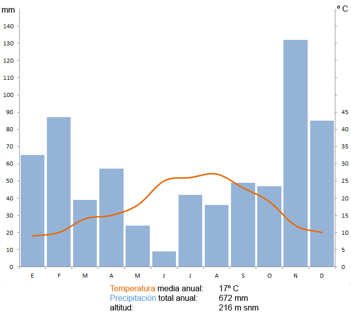 Climográma de Puente Genil (Córdoba-España) elaborado a partir de los datos climáticos recogidos en dicho municipio